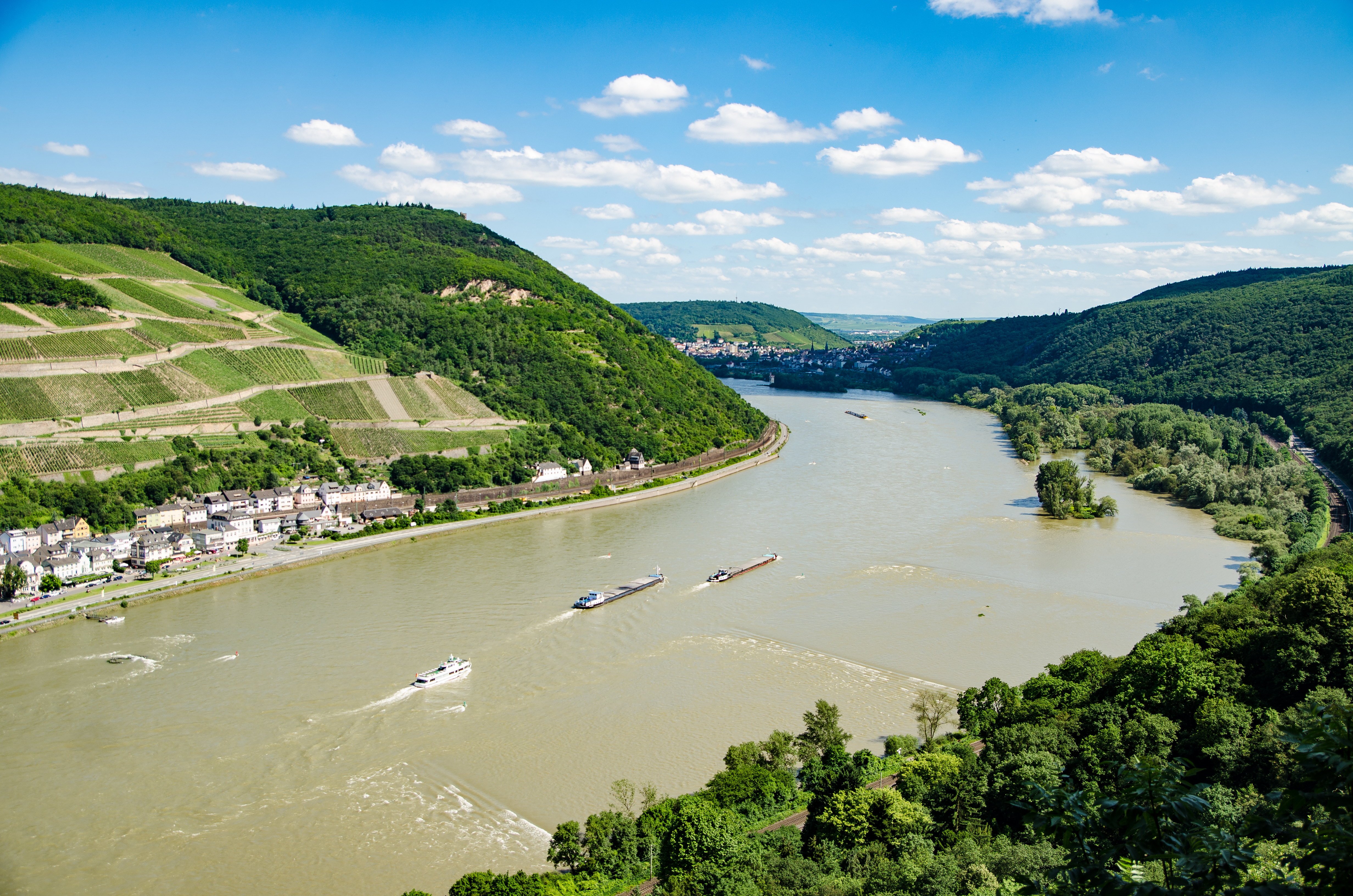 Schiffsverkehr unterhalb des Binger Lochs, im Hintergrund Bingen und Nahetal